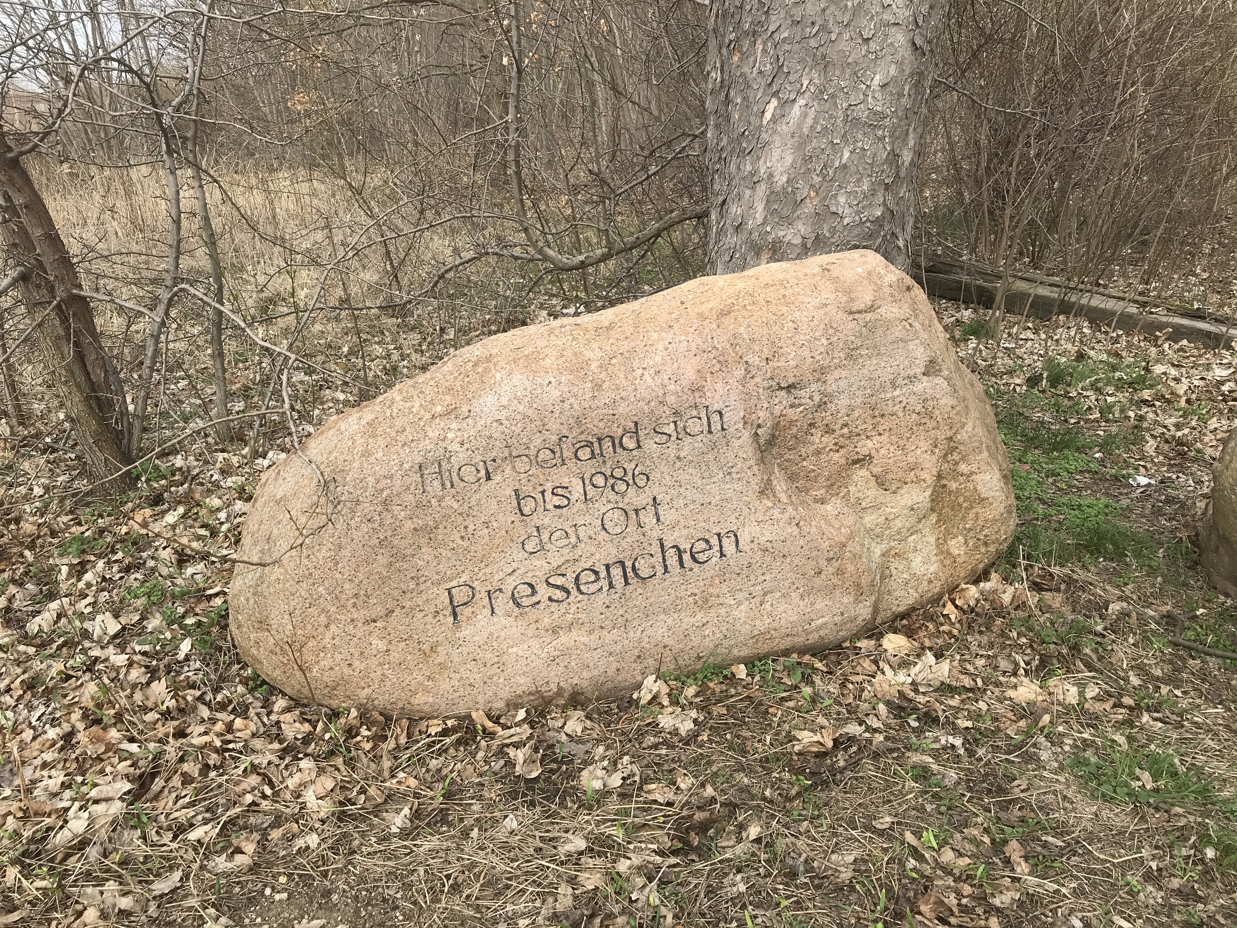 Findling, der an den devastierten Ort Presenchen in der Niederlausitz erinnert